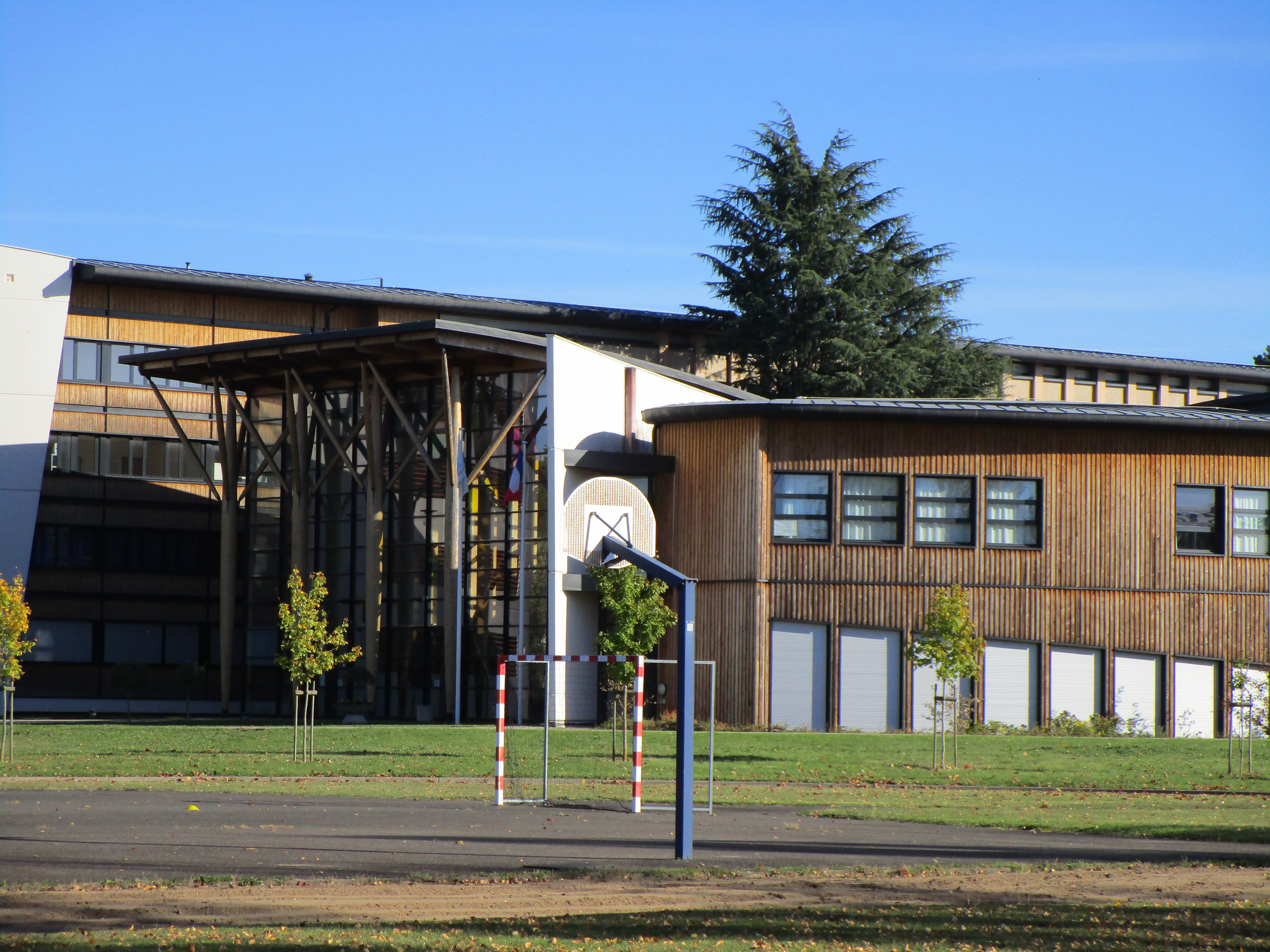 Le lycée professionnel Victor Laloux de Tours, dans le quartier Montjoyeux-Grandmont.